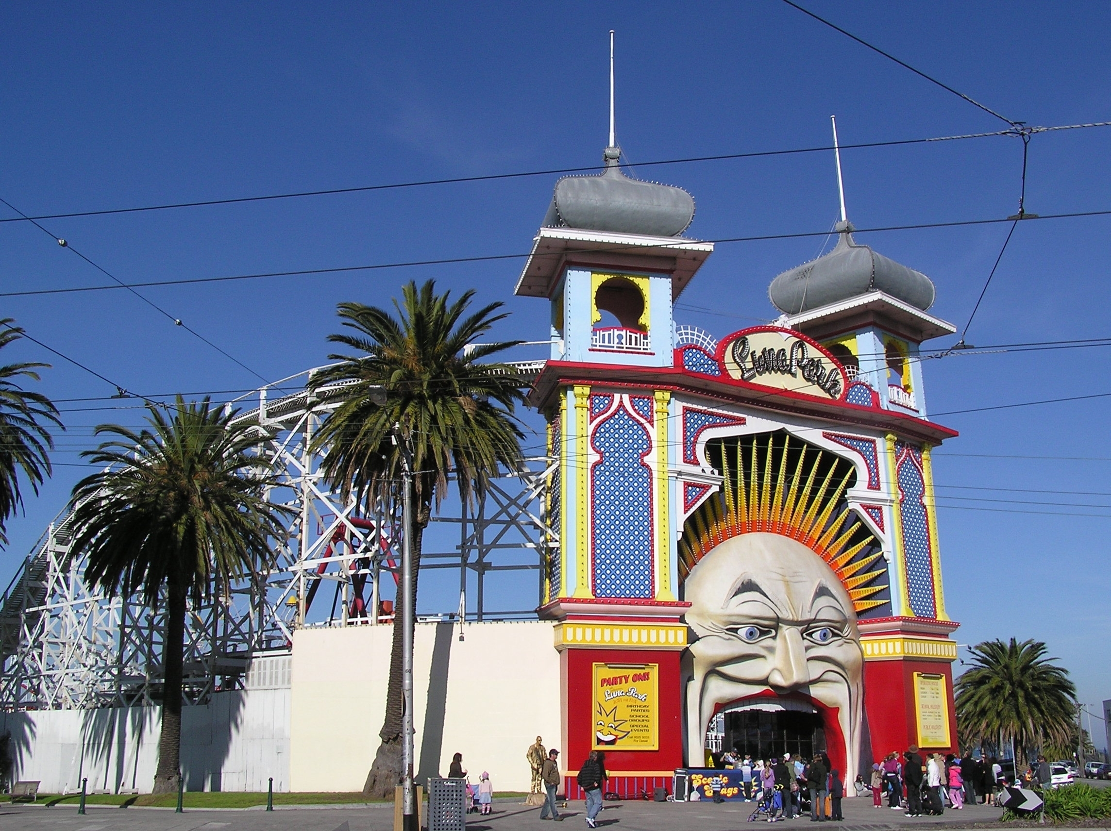 Luna Park in St Kilda, Melbourne